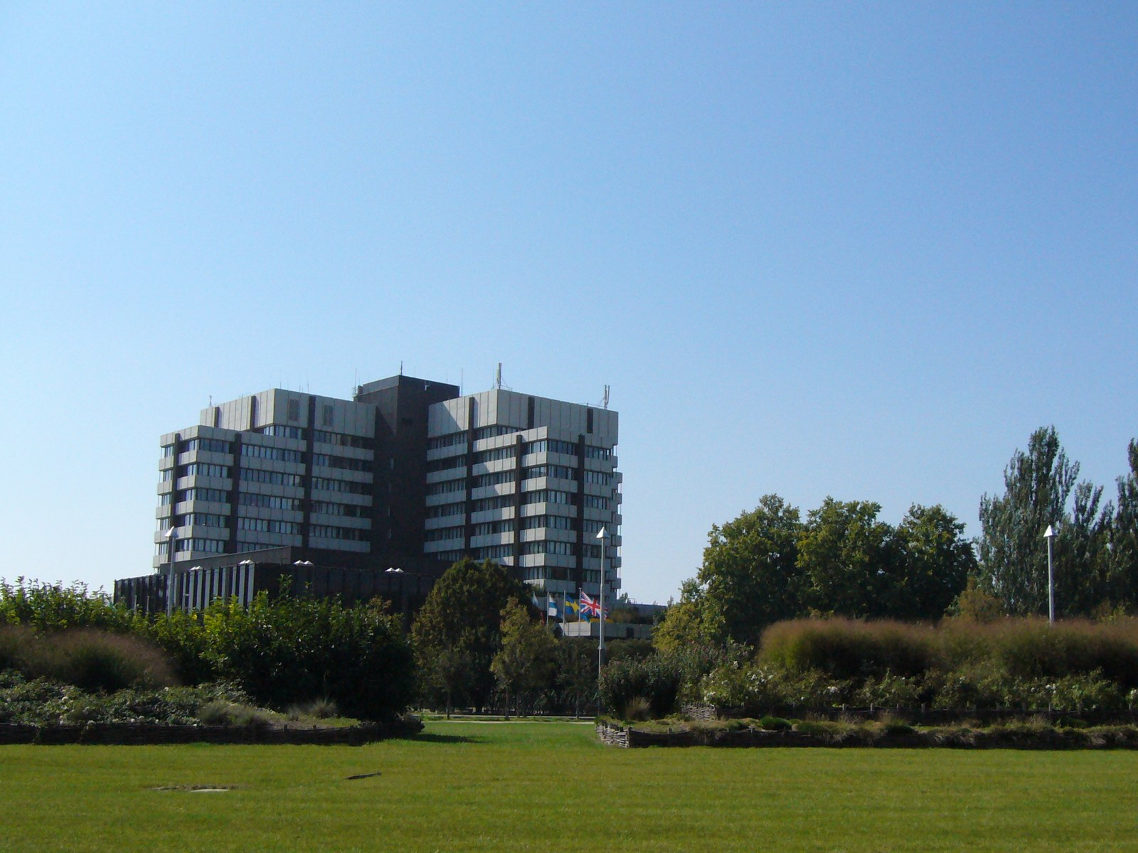 Le centre administratif de la communauté urbaine de Strasbourg.